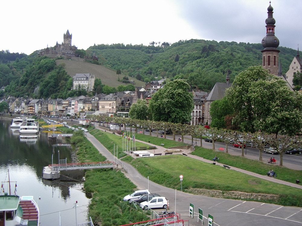 Vue de Cochem (Allemagne) Source: photo perso Rémi stosskopf Date: 09.05.2003